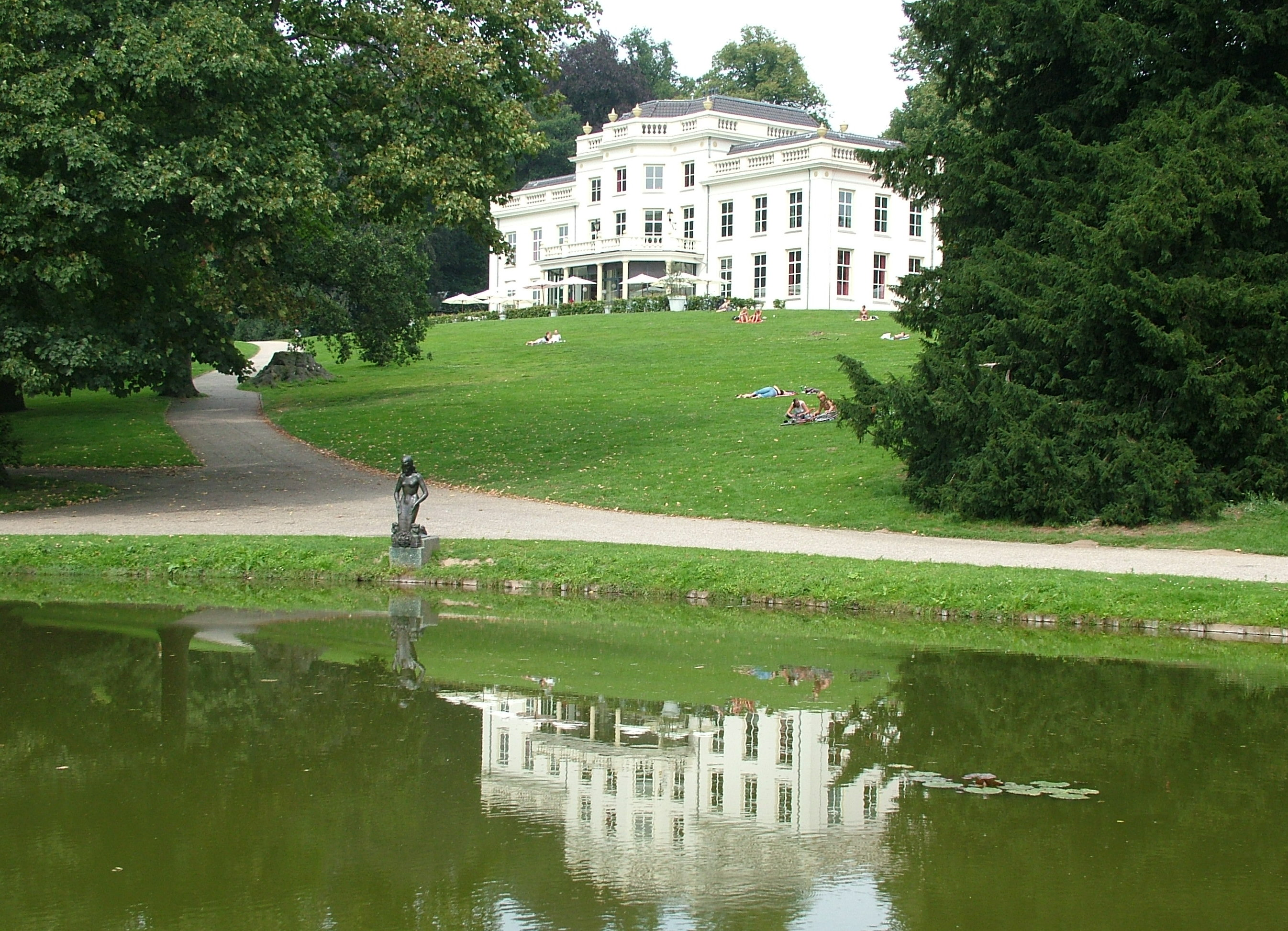 Park Sonsbeek, Arnhem